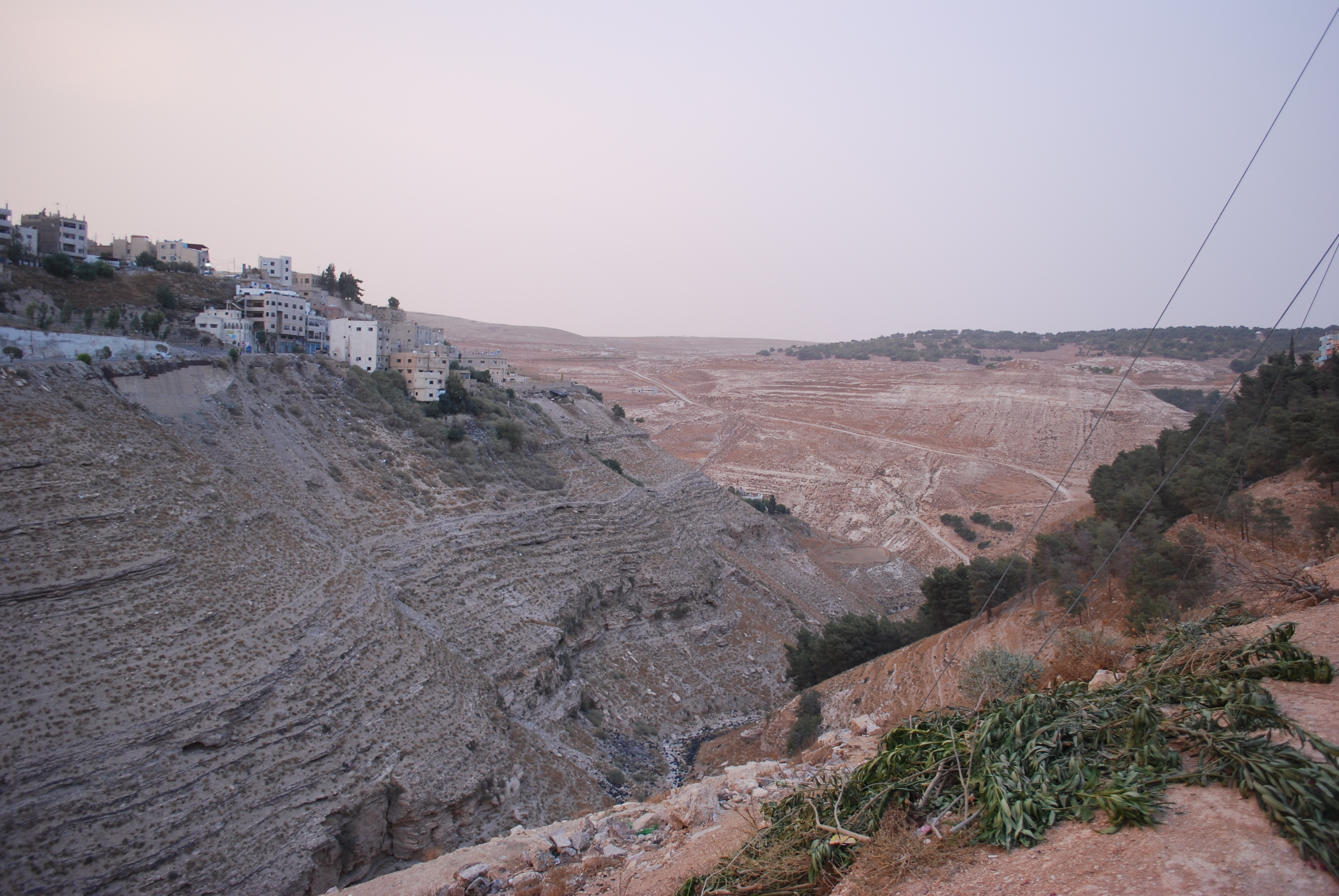 Vue de Al-Karak.